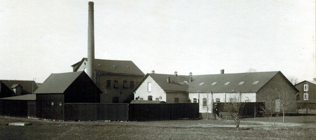 Fabriksbyggnad för lädertillverkning i södra Sverige